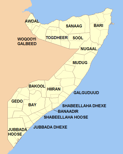 Régions composant la Somalie